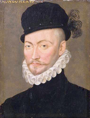 Portrait de Gabriel Ier de Montgommery